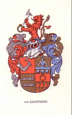 von Kauffmann's våbenskjold